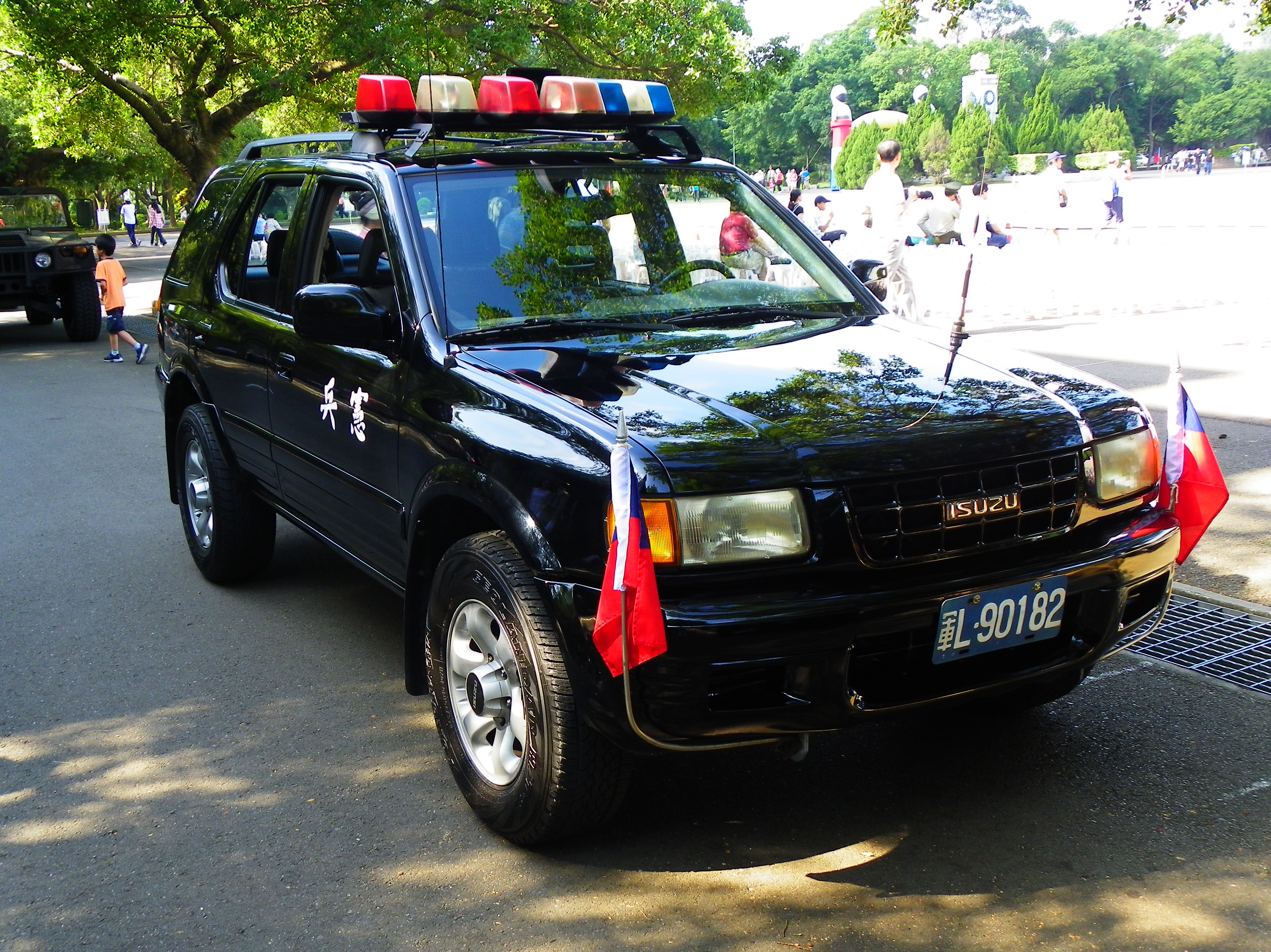 中文（台灣）: 2012年憲兵學校林口校區營區開放活動，車輛分列式開始前，停放操場外的五十鈴陸地龍警備車。